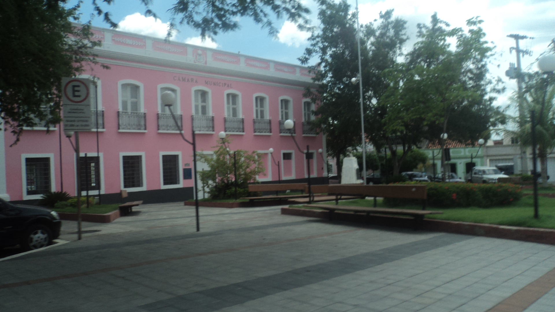 Camara